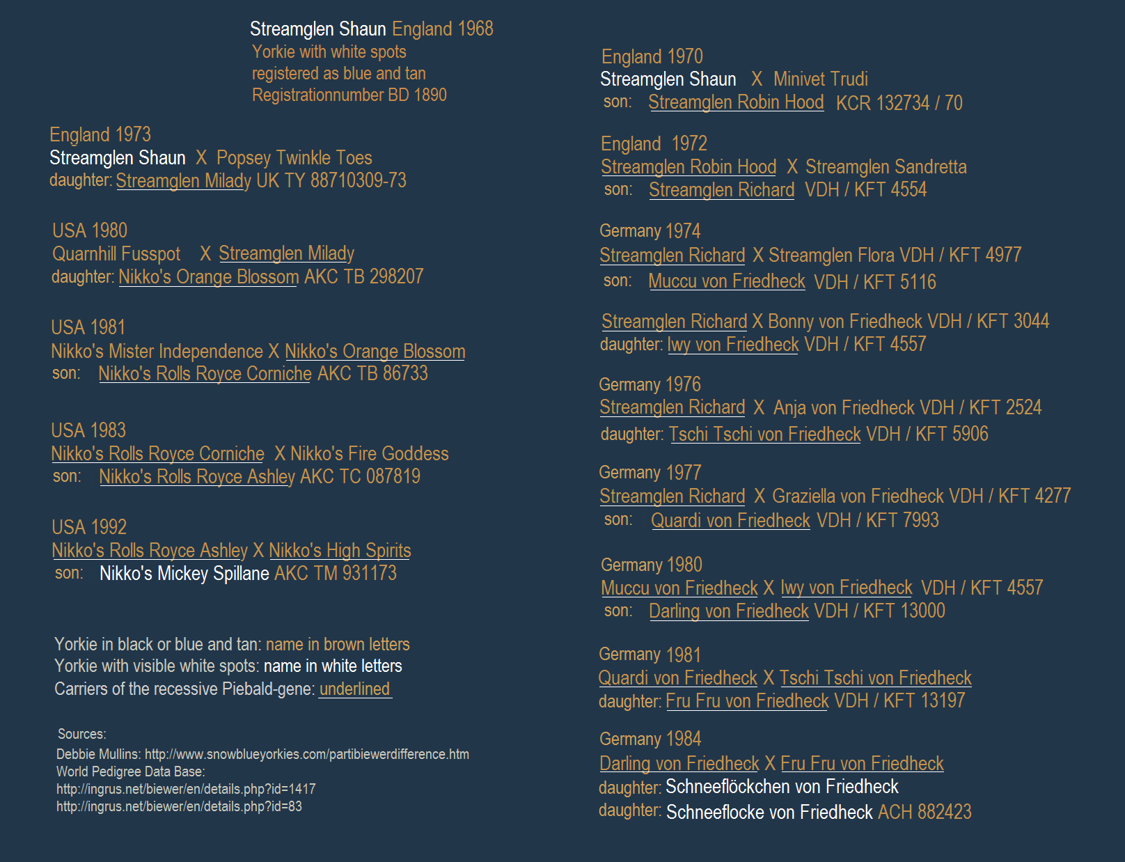 Origin of Biewer and Parti-Color Yorkshire Terrier